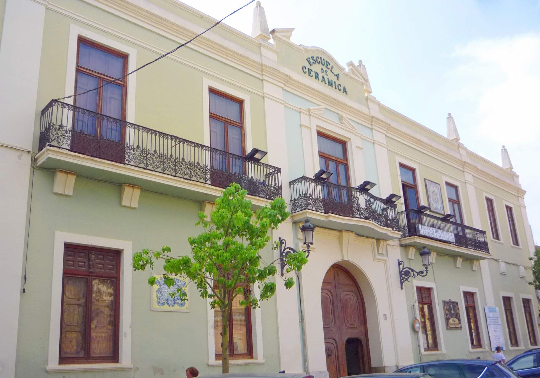 Escola de Ceràmica de Manises (Manises, Valencia)